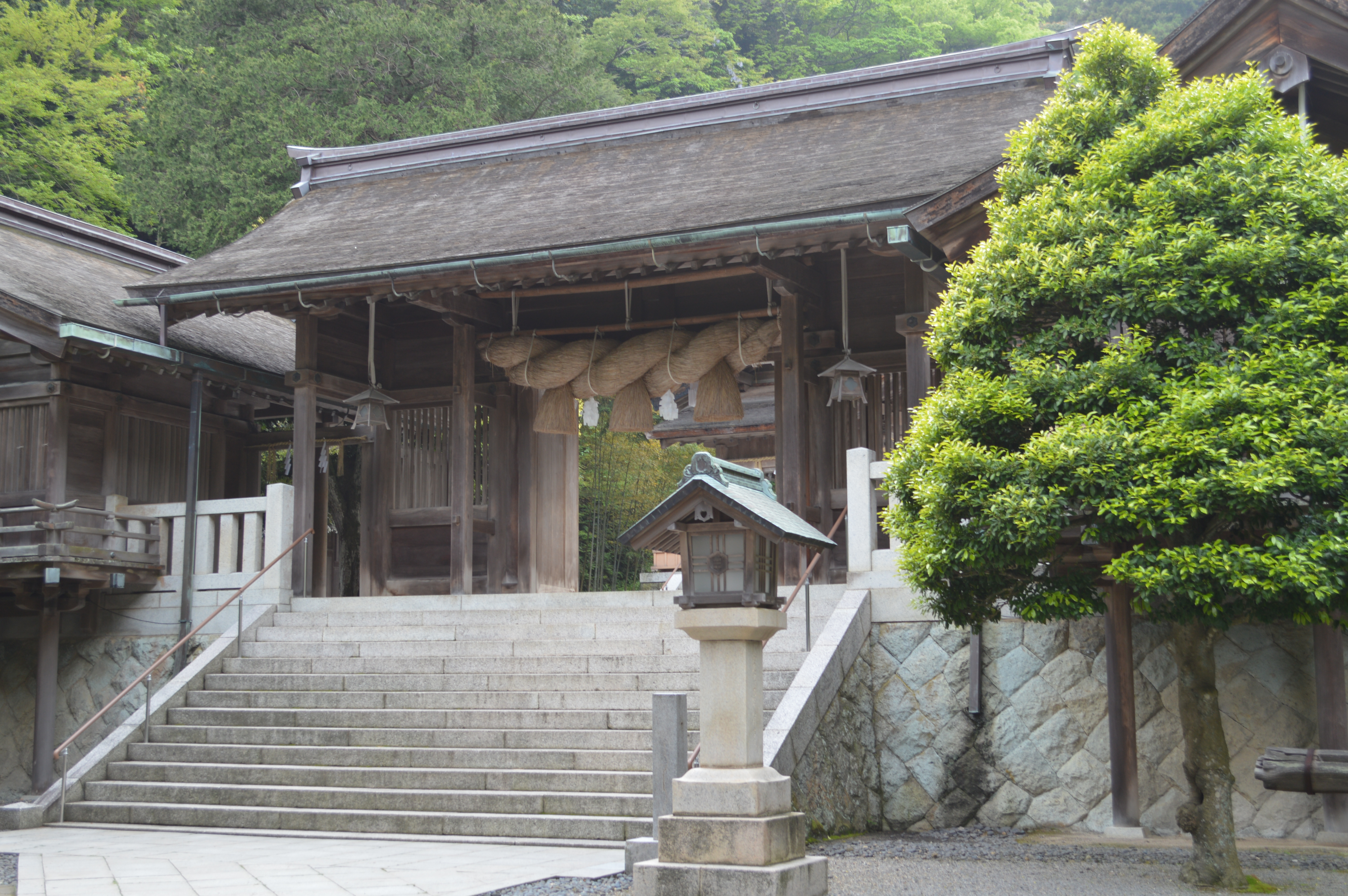 美保神社神門